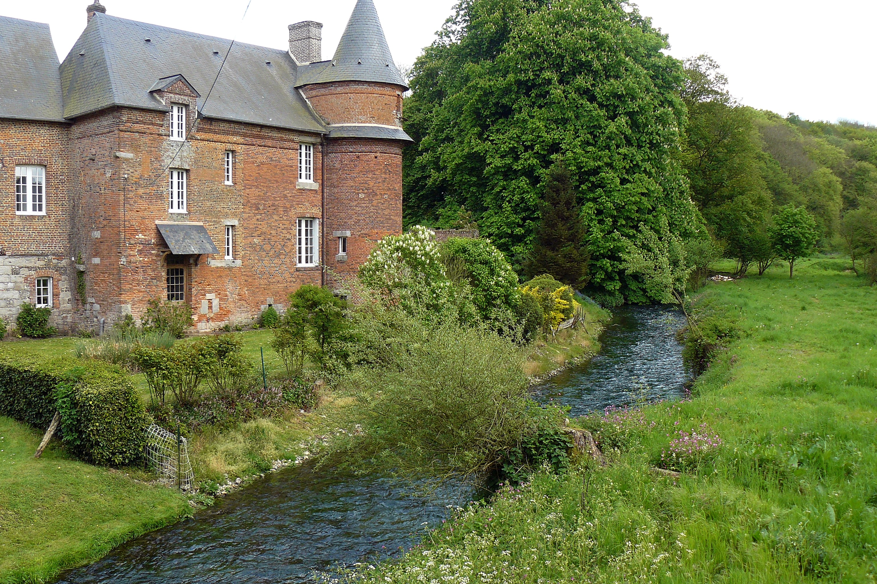 La rivière Saâne à hauteur du pont sur la RD 107 (partie du GR 212B), entre Biville-la-Rivière et Royville (Seine-Maritime, France)